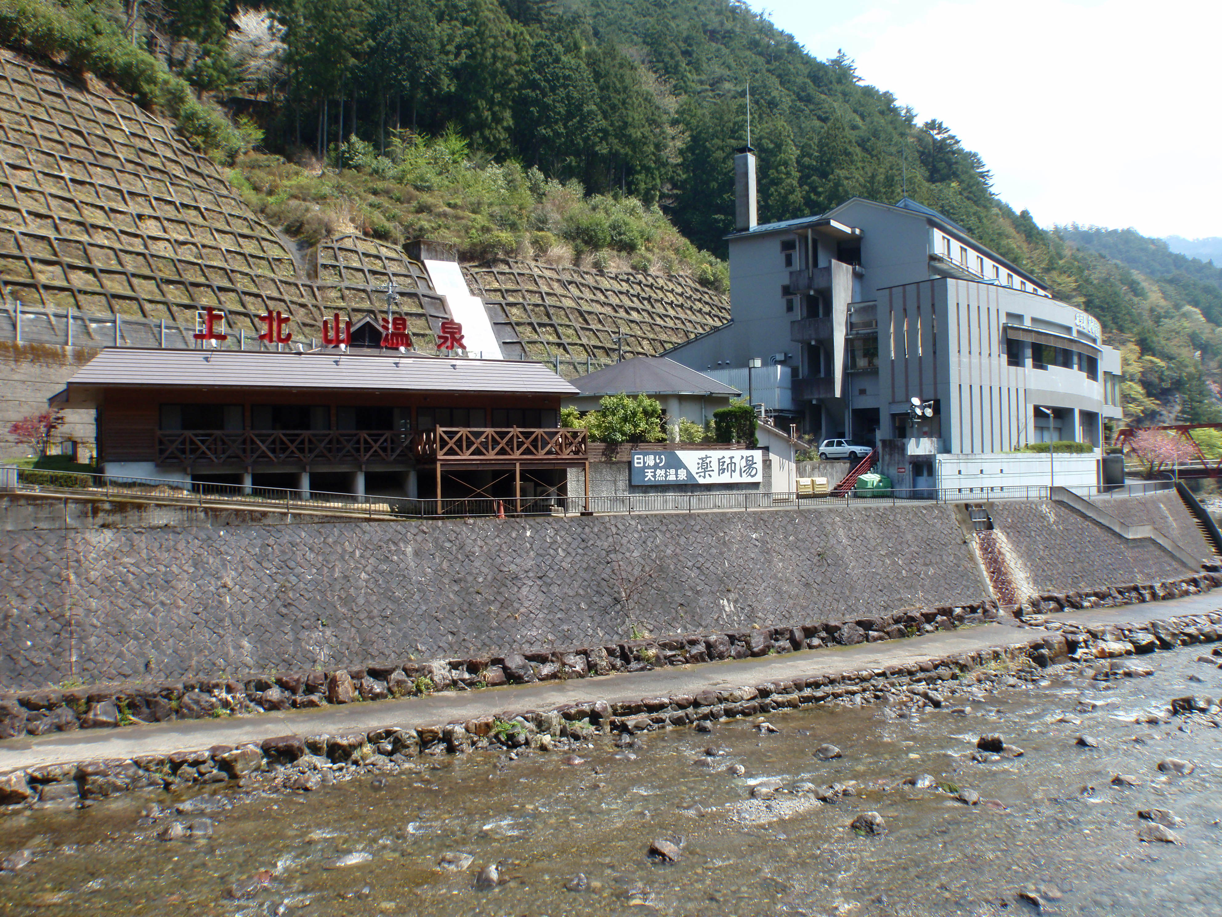 奈良県上北山村にある上北山温泉。左が日帰り入浴施設「薬師湯」、右が「ふれあいの郷ホテルかみきた」。